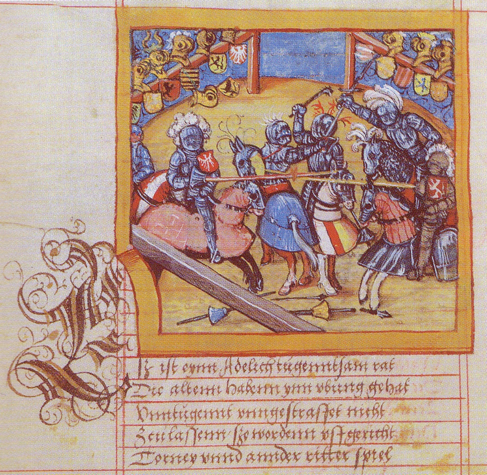 Landesbibliothek Mecklenburg-Vorpommern, Ms. 376, folio 74. Turnier zu Rostock 1311 als Ausdruck ritterlicher Tugend. Text: Esz ist eynn Adelich tugenntsam rat Die altenn habenn ynn vbung gehat Vnntugennt vnngestraffet nicht Zculassenn szo wordenn vffgericht Torney vnnd annder ritter spiel ... cf. (LIV.)